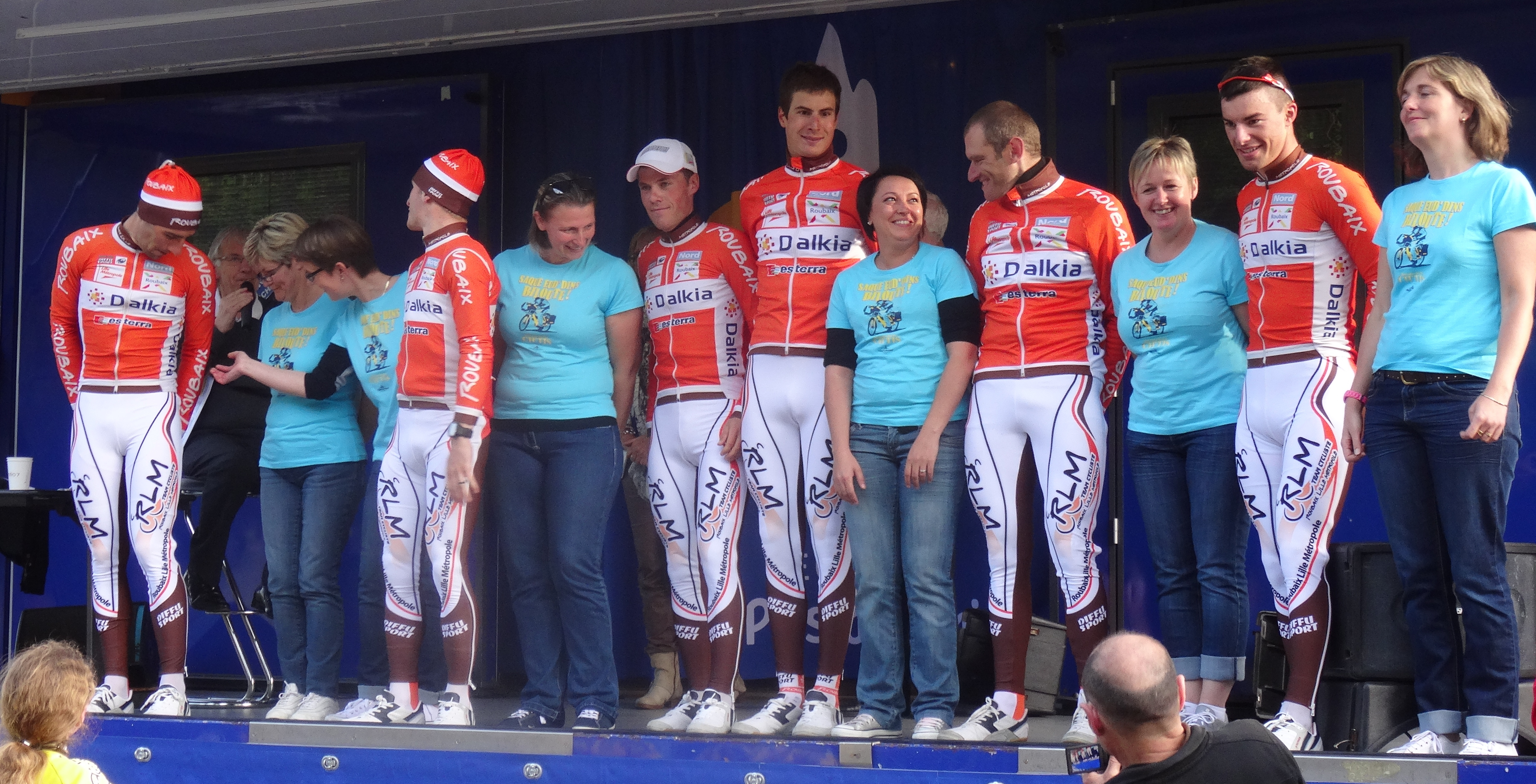 Reportage photographique réalisé le vendredi 23 mai 2014 à l'occasion de l'arrivée de la première étape du Paris-Arras Tour 2014 devant la citadelle d'Arras, Pas-de-Calais, Nord-Pas-de-Calais, France.